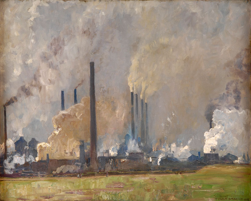 Eugen Bracht (1842–1921): Hoeschstahlwerk von Norden. Signiert. Datiert 1905. Rückseite betitelt. Öl/Lwd., 70 x 86 cm